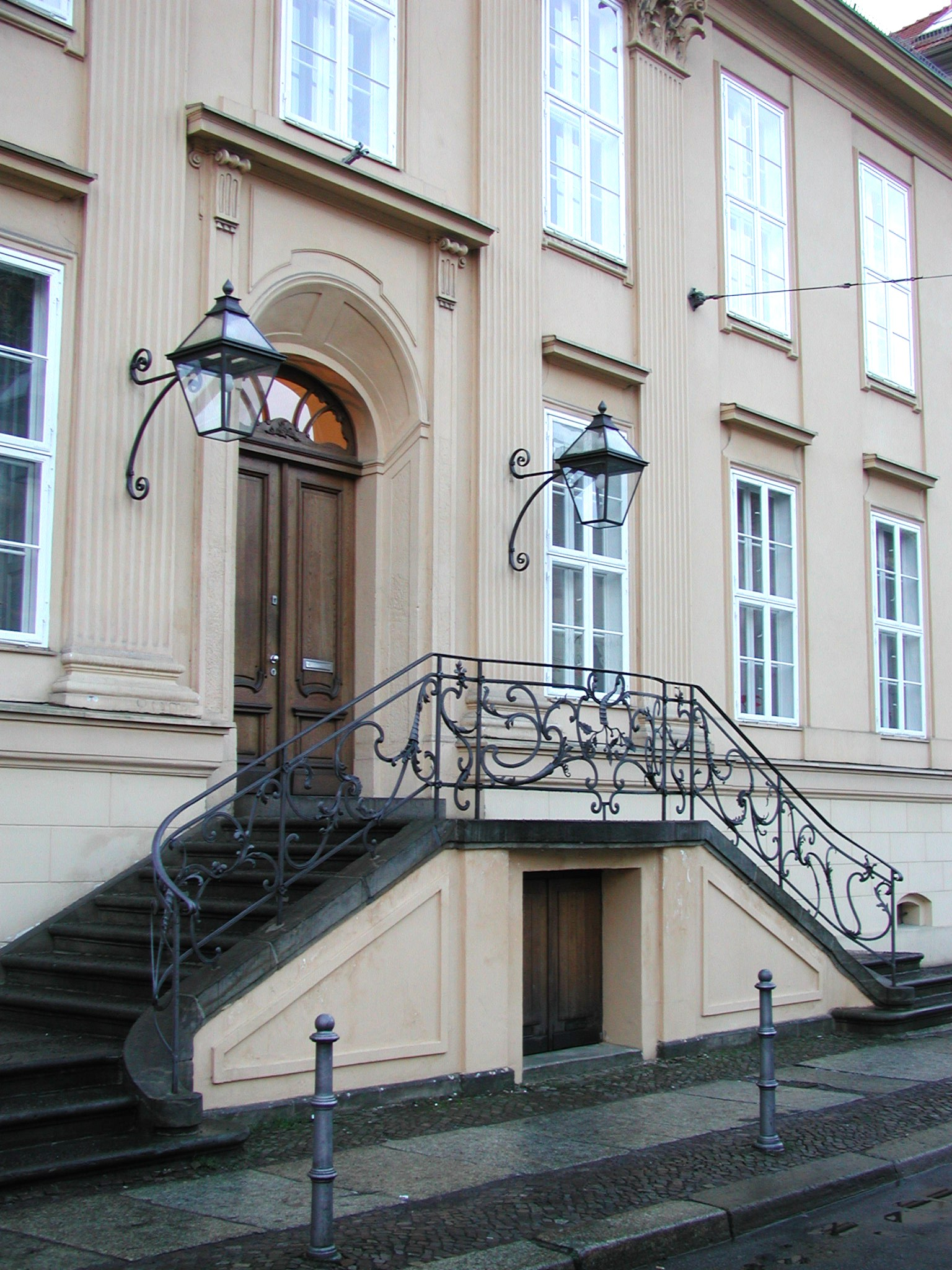 Der Eingangsbereich vom Magnushaus in Berlin-Mitte /the entrance of the Magnushaus